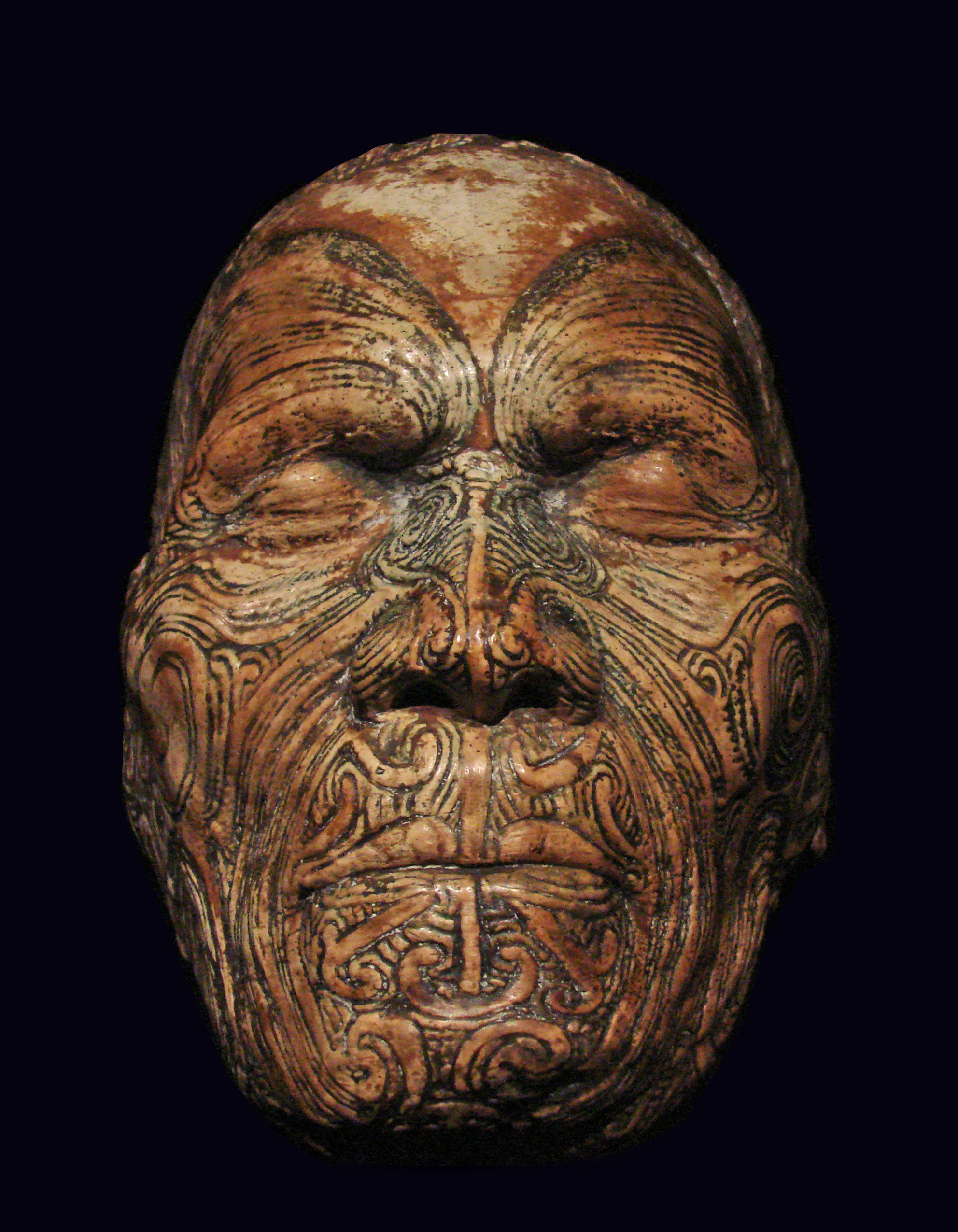 Moulage du visage de Wiremu Te Manewha, grand chef māori vers 1885 plâtre et peinture Gottfried Lindauer et Sir Walter Buller Site sur des portraits maoris Il ne s'agit pas d'un masque mortuaire de ce grand chef māori mort en 1891 mais d'un moulage de son visage tatoué réalisé avec son accord par Gottfried Lindauer à la fin des années 1880. Cette oeuvre est considérée par ses descendants comme un "Taonga" entouré du plus grand respect. Elle illustre l'importance du culte des ancêtres dans la culture māori. Exposition "Māori. Leurs trésors ont une âme" au musée du quai Branly, jusqu'en janvier 2012 Cette exposition-manifeste, accueillie par le musée, a été réalisée par le Musée de Nouvelle-Zélande Te Papa Tongarewa. Elle permet de découvrir la culture māori dans toutes ses dimensions, d'appréhender des éléments majeurs de l'histoire de ce peuple et de percevoir leurs relations et leurs conflits avec les anciens colons occidentaux de la Nouvelle-Zélande Aotearoa d'aujourd'hui.